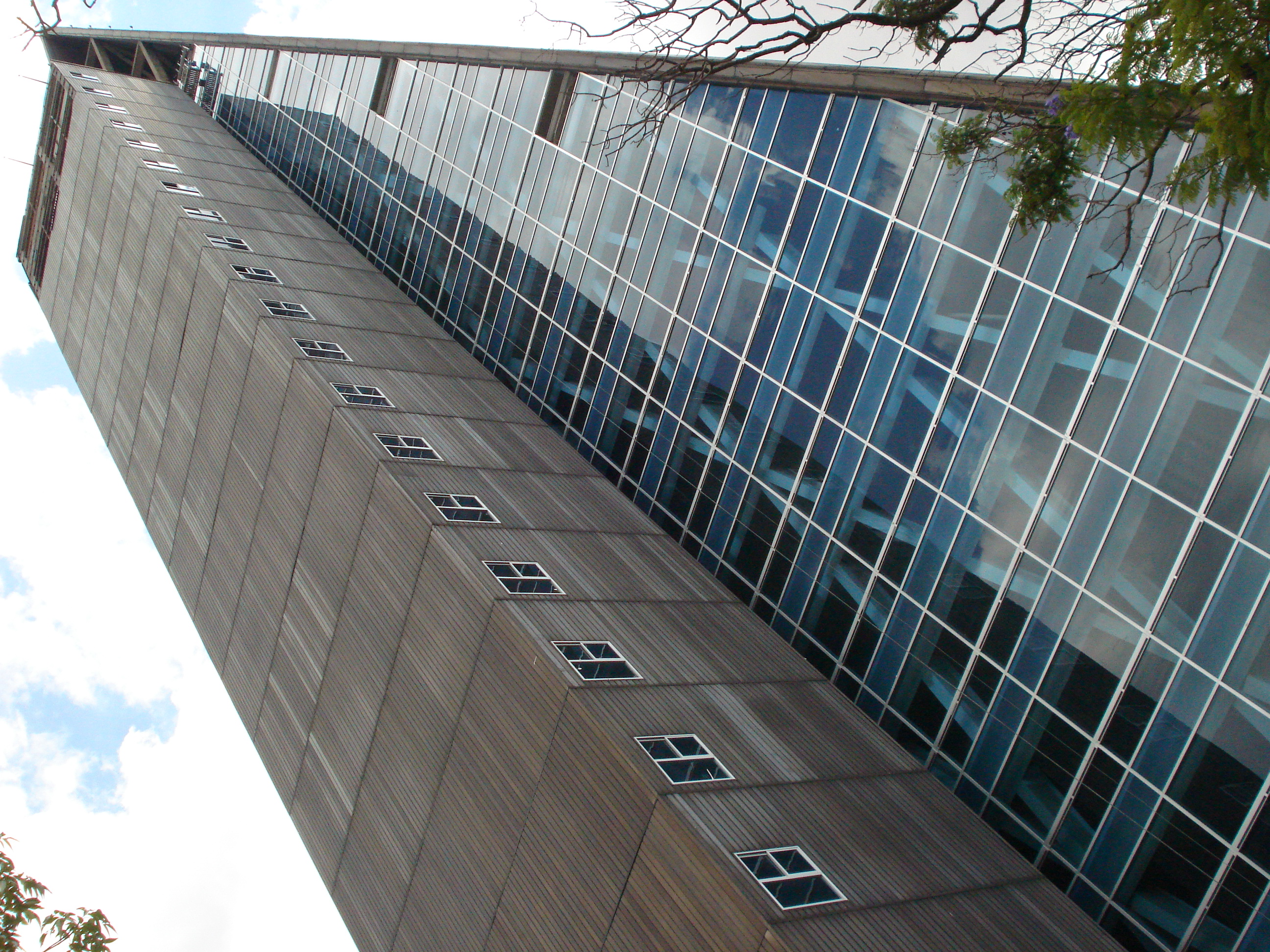 Fachada norte de la Torre Insignia de Ciudad de México.